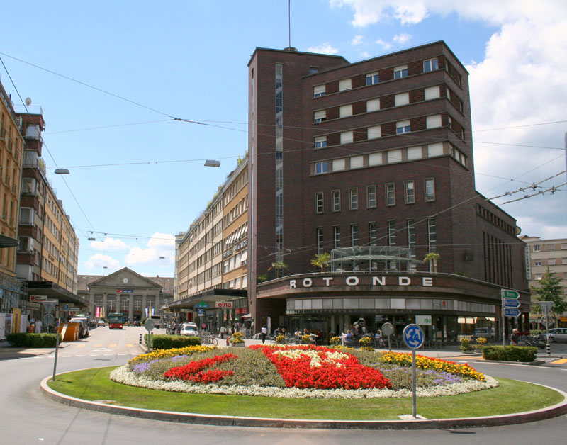 Volkshaus Biel-Bienne 1930 - 1932